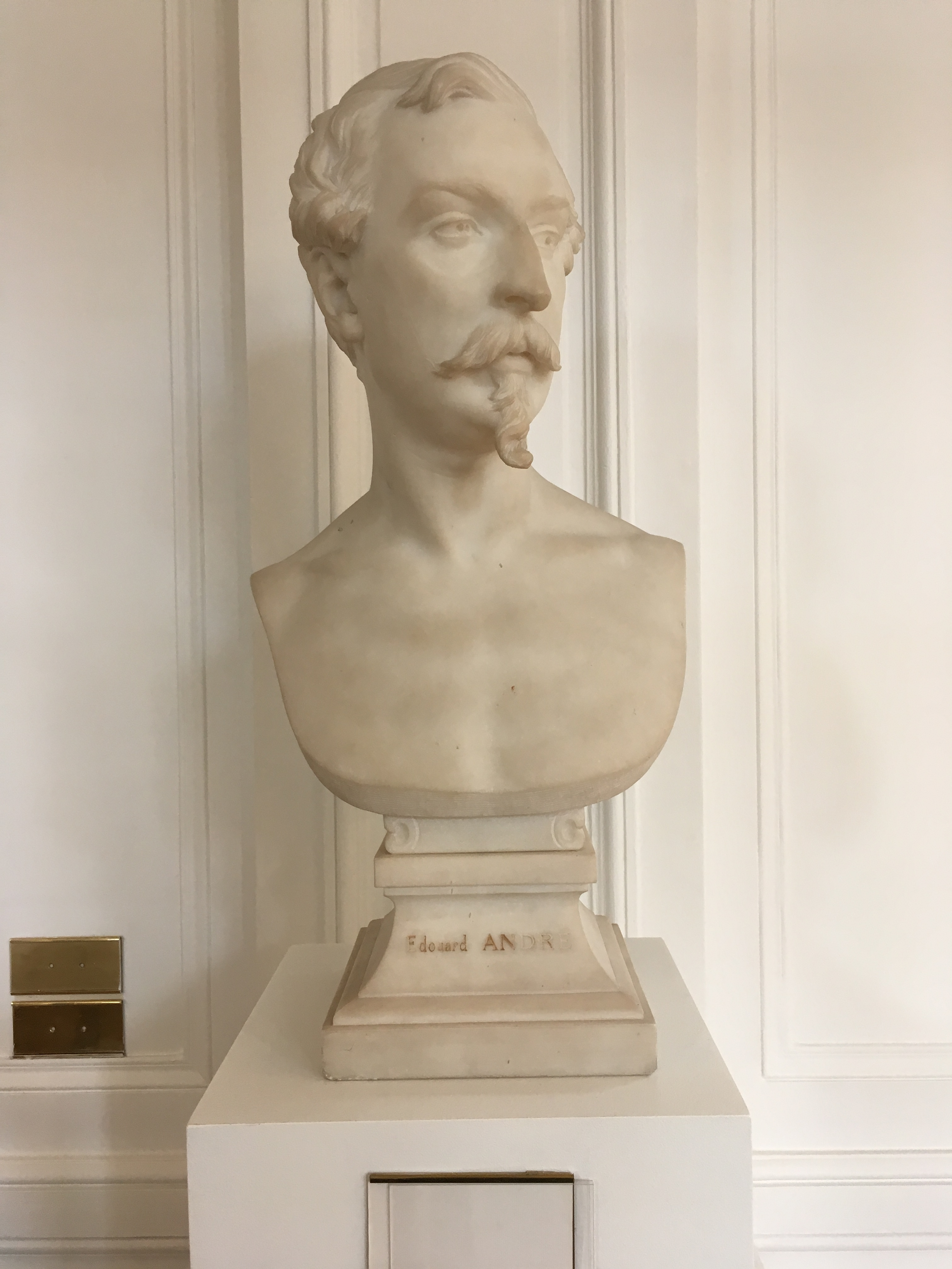 Jean-Baptiste Carpeaux, Buste d'Edouard André, 1863, marbre, Paris, musée d'Orsay